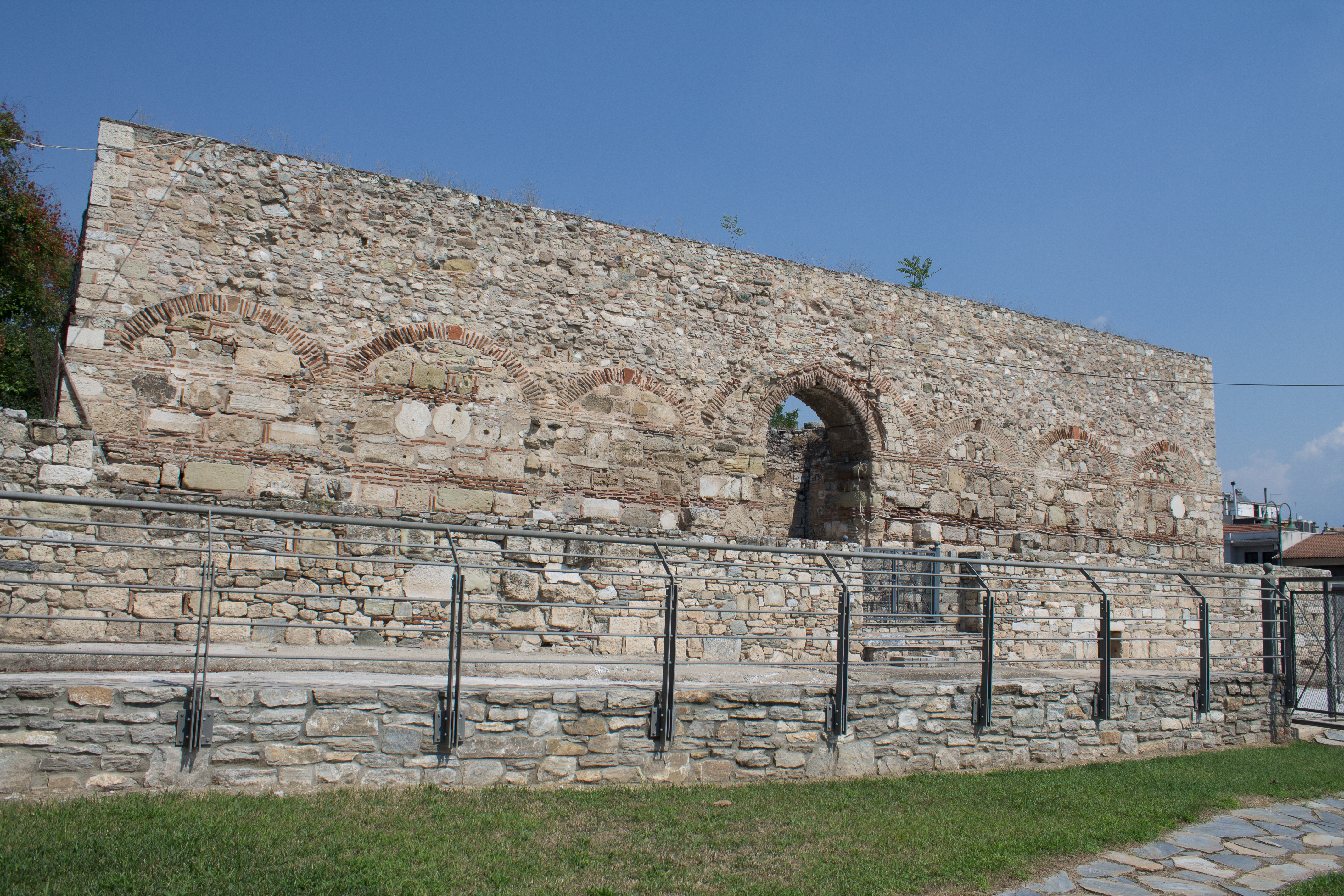 Μπεζεστένι, σκεπαστή οθωμανική αγορά υφασμάτων και πολύτιμων εμπορευμάτων, νότια πλευρά«Αρχαιολογικός χώρος Φρουρίου Λάρισας»